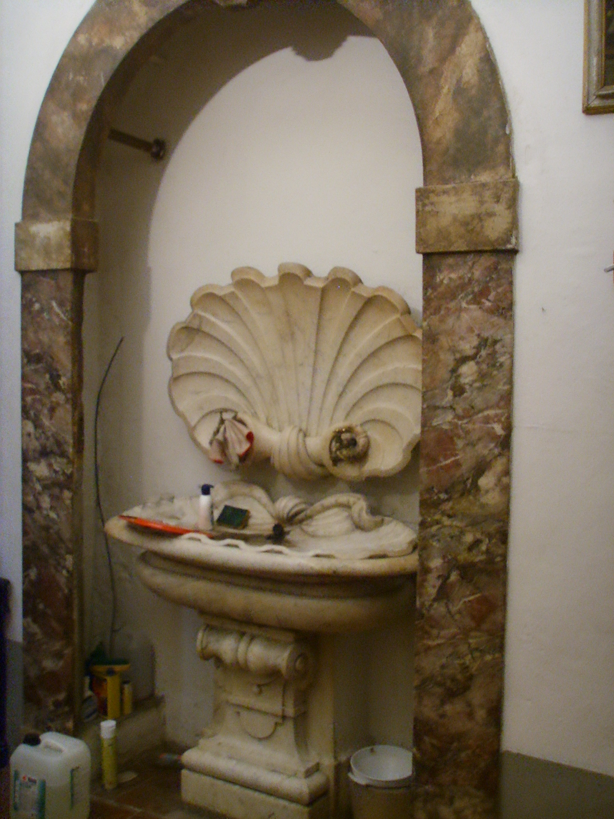 Chiesa di san gaetano, sagrestia, lavabo di orazio mochi